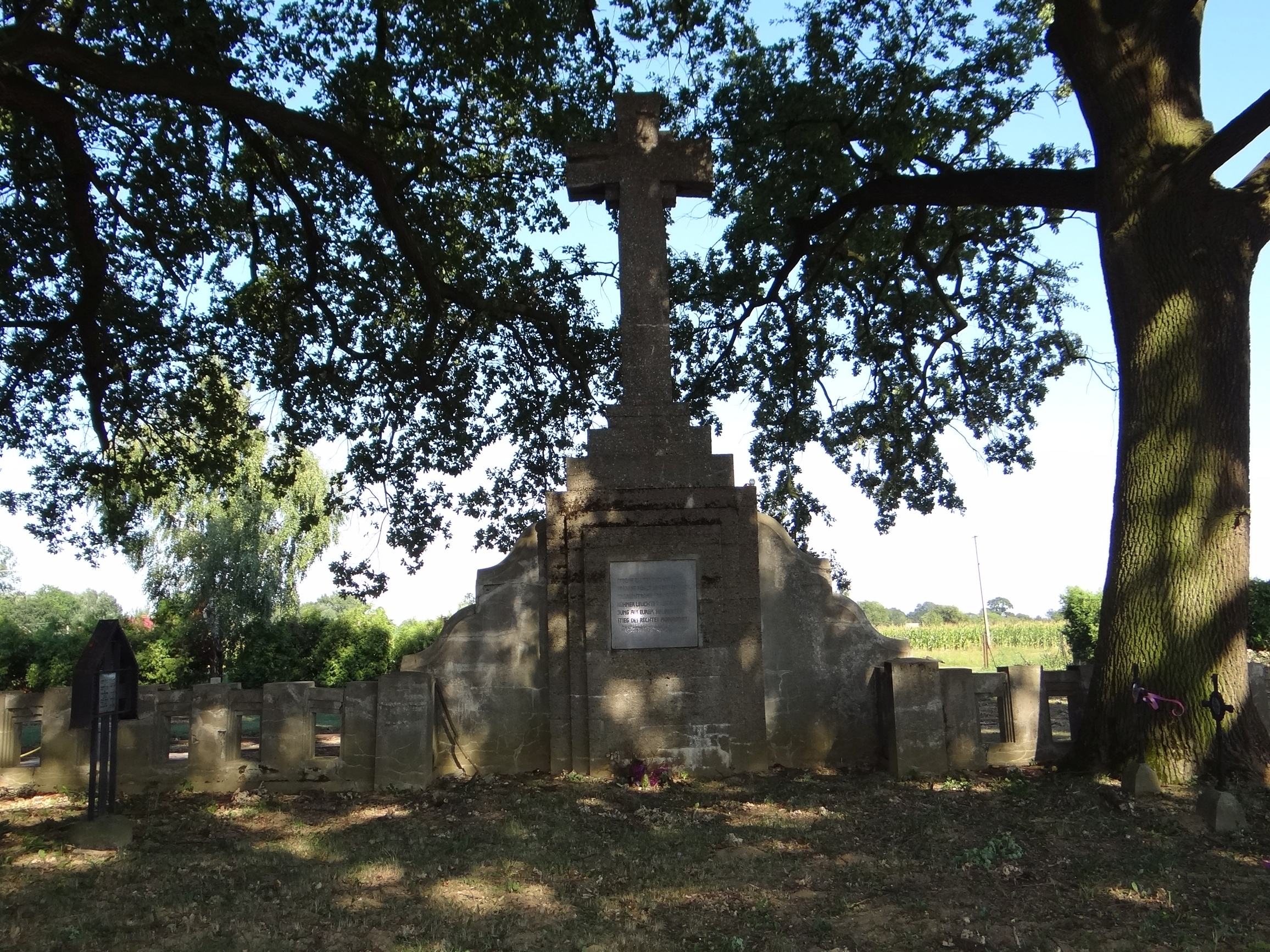 Cmentarz wojenny nr 255 - Wietrzychowice